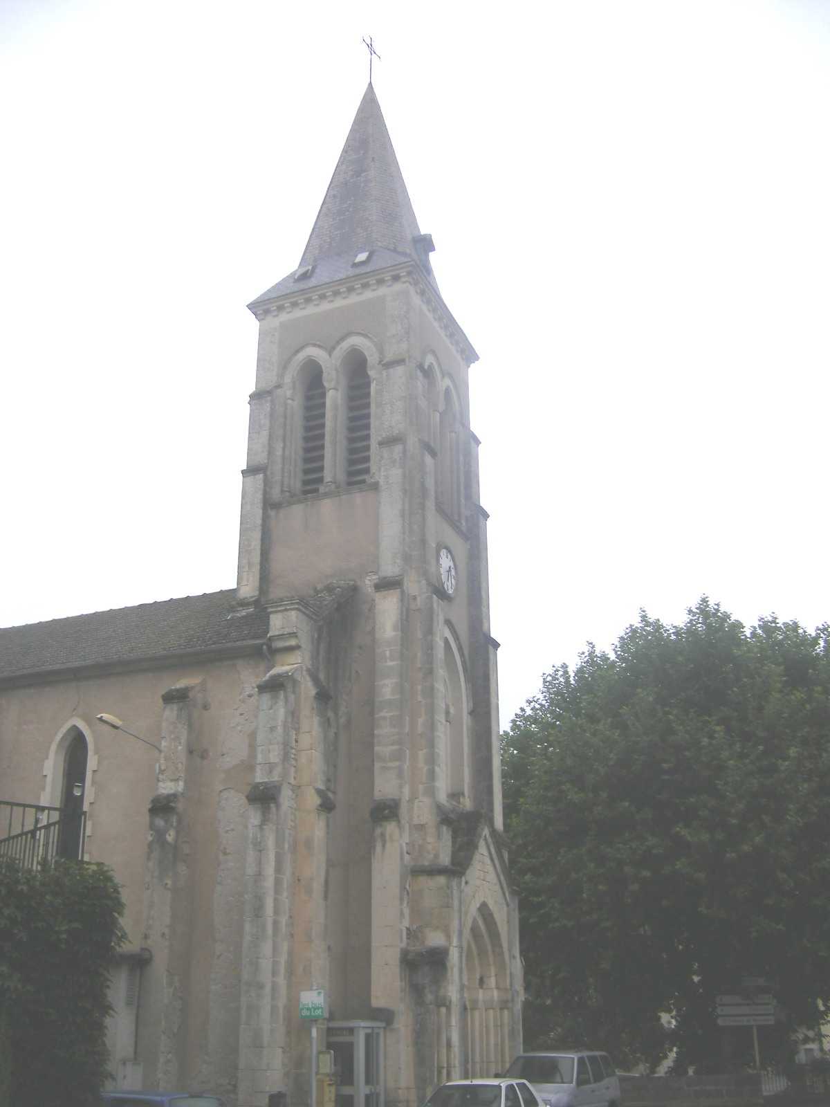 Laroque-des-Arcs